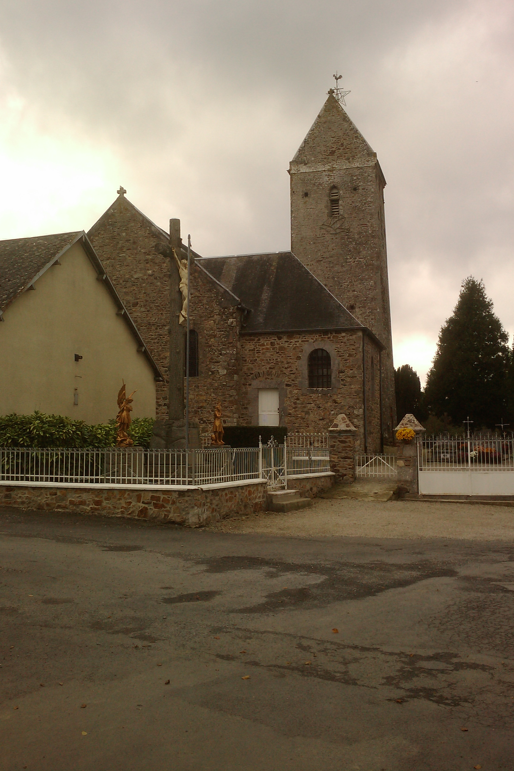 Église d'Ouville